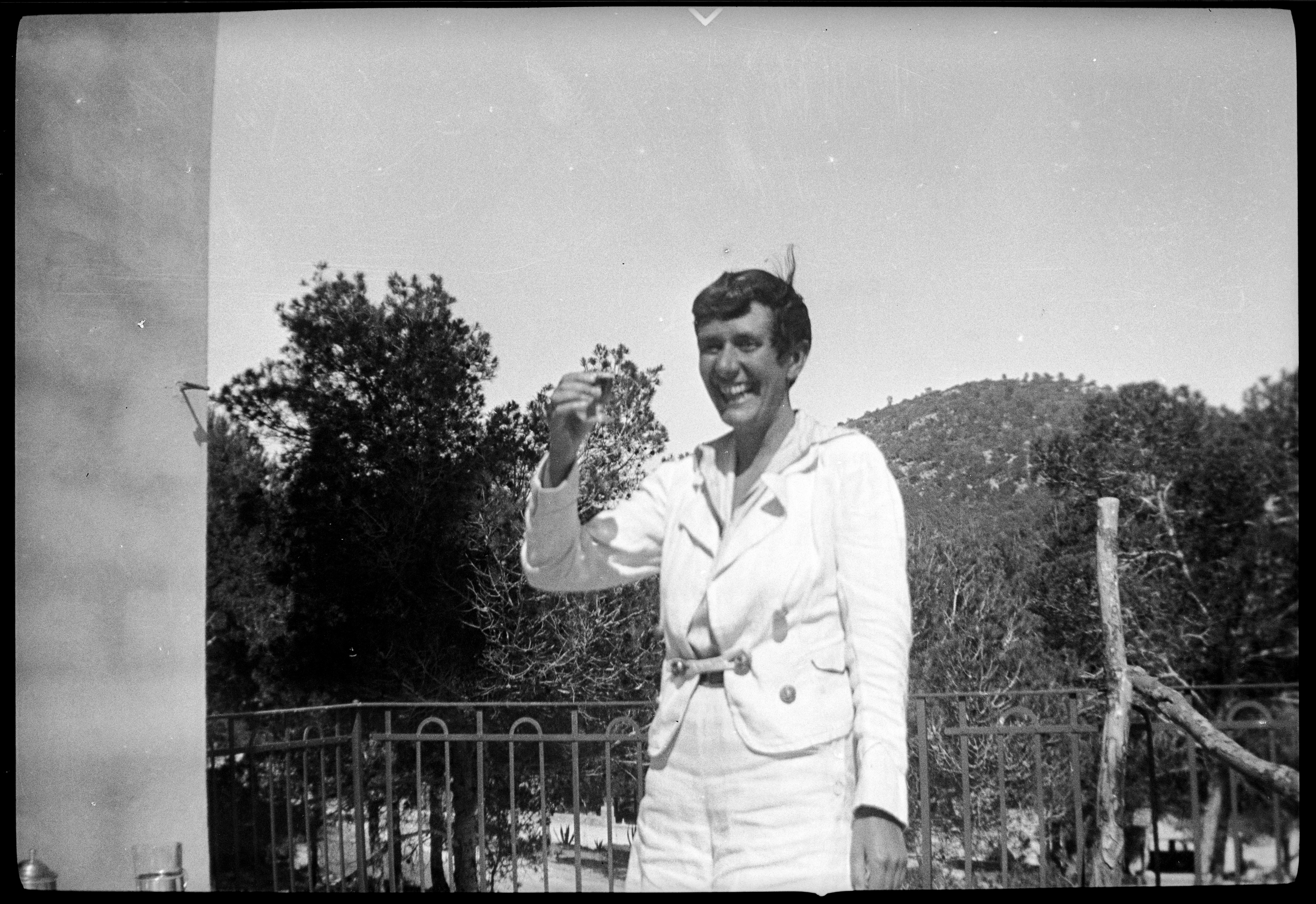 Frankreich, Lavandou: Menschen [Lokalisierung unsicher]; Erika Mann